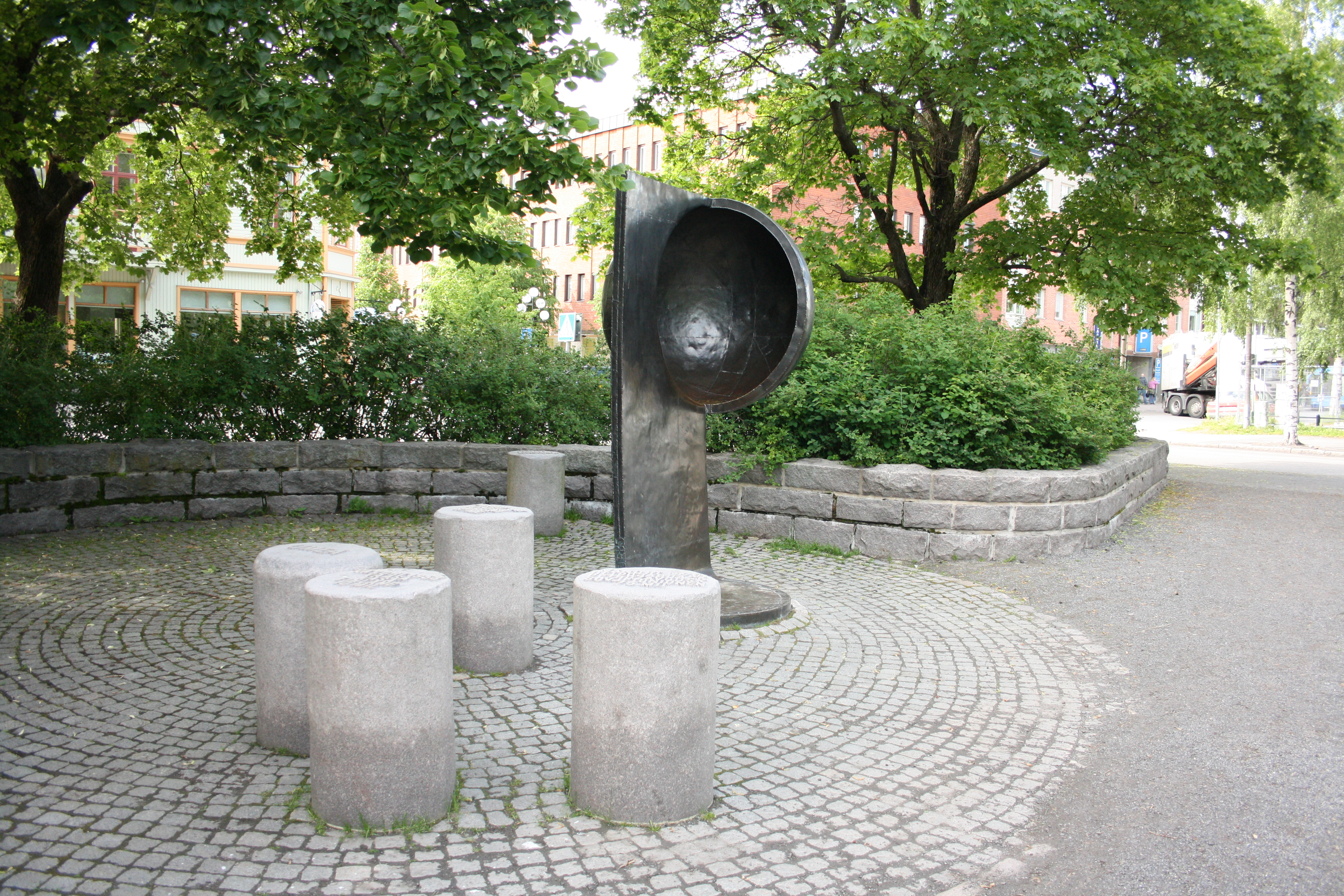 Skulptur av Ante Dahlstedt